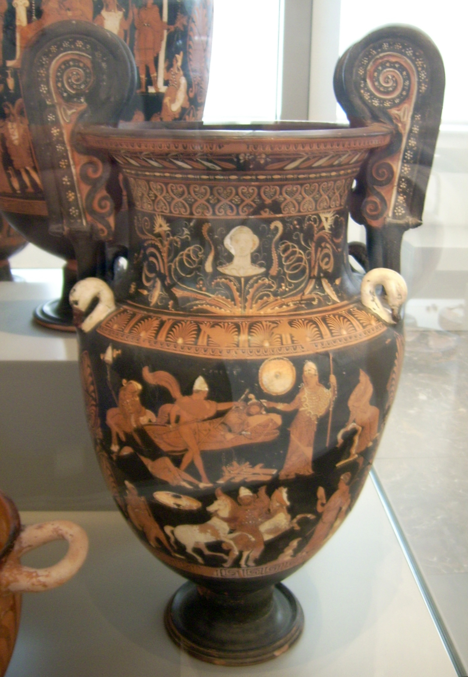 Rhesos-Krater, dem Dareios-Maler zugeschrieben